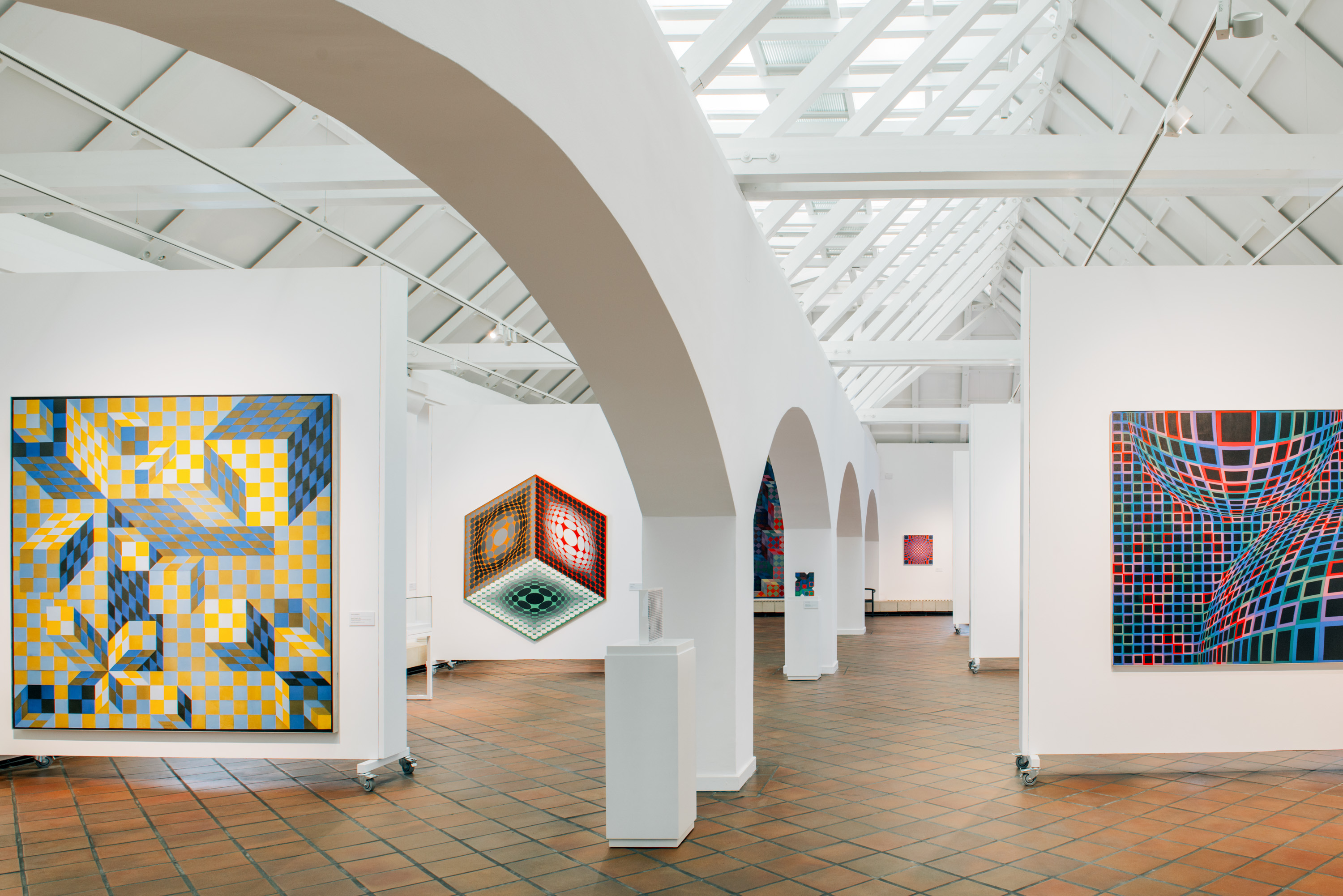 Fotó: Szépművészeti Múzeum